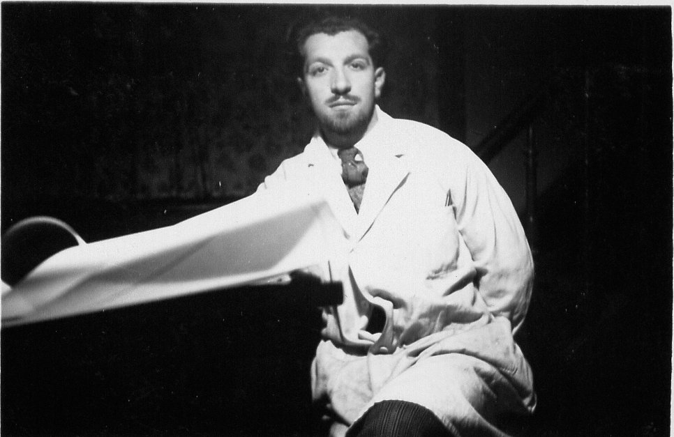 29 janv. 1936, le sculpteur René van Dievoet (1908-1978). René van Dievoet, sculpteur et peintre belge, ancien élève de l'Académie Royale des Beaux-Arts de Bruxelles (atelier Rombaux) et de l'Académie de Saint-Gilles (atelier Léandre Grandmoulin), est né à Ixelles le 15 octobre 1908 et décédé à Ixelles le 17 janvier 1978. Source: Paul Piron, Dictionnaire des artistes plasticiens de Belgique des XIXe et XXe siècles, Bruxelles, 2003, tome II, p. 619.